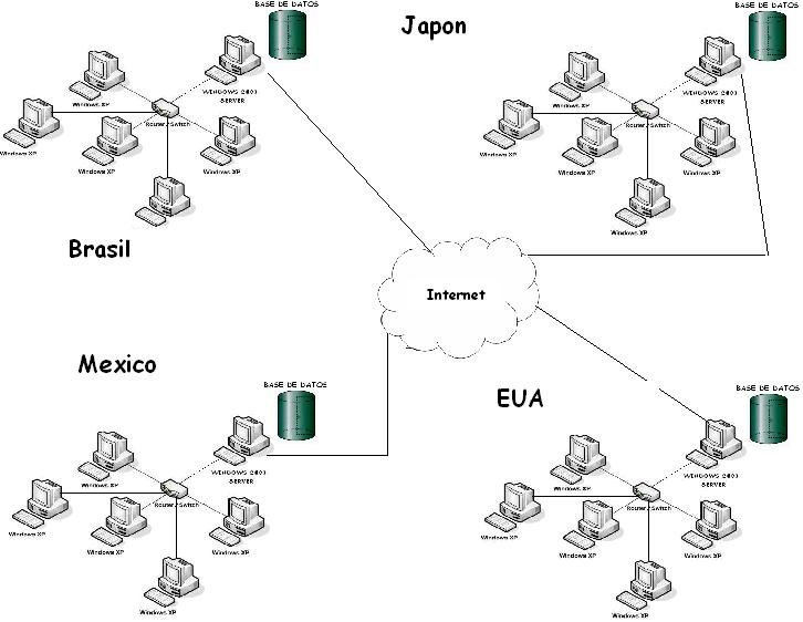 Base de Datos distribuida atravez de internet